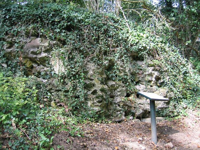 Herapel (Cocheren)